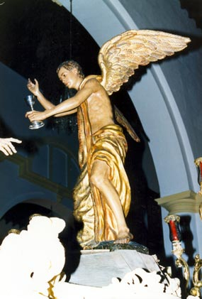 Angel Oracion Huerto Huelva